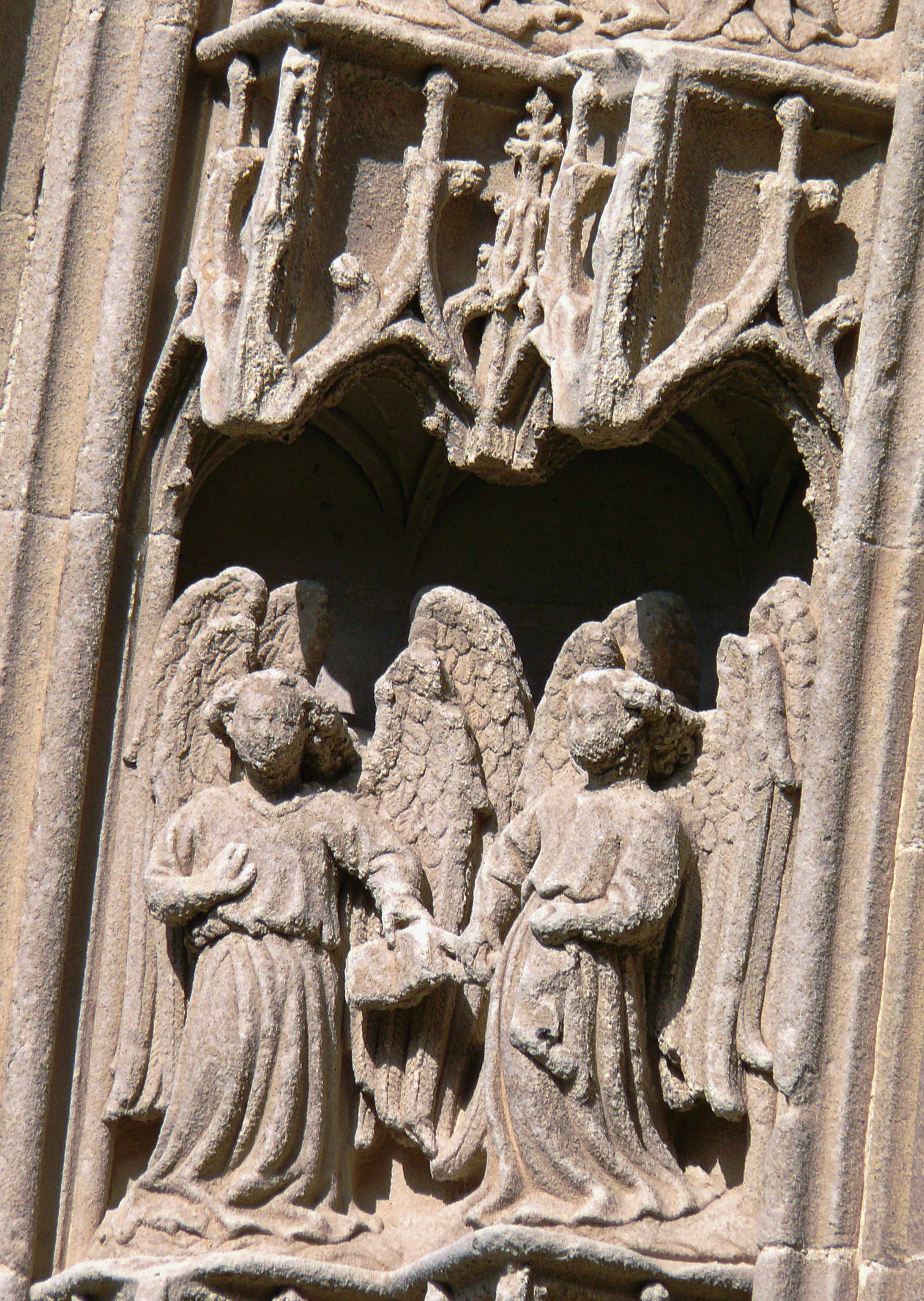 Abbatiale de Saint-Antoine-l'Abbaye - Portail central - Voussure : sculpture